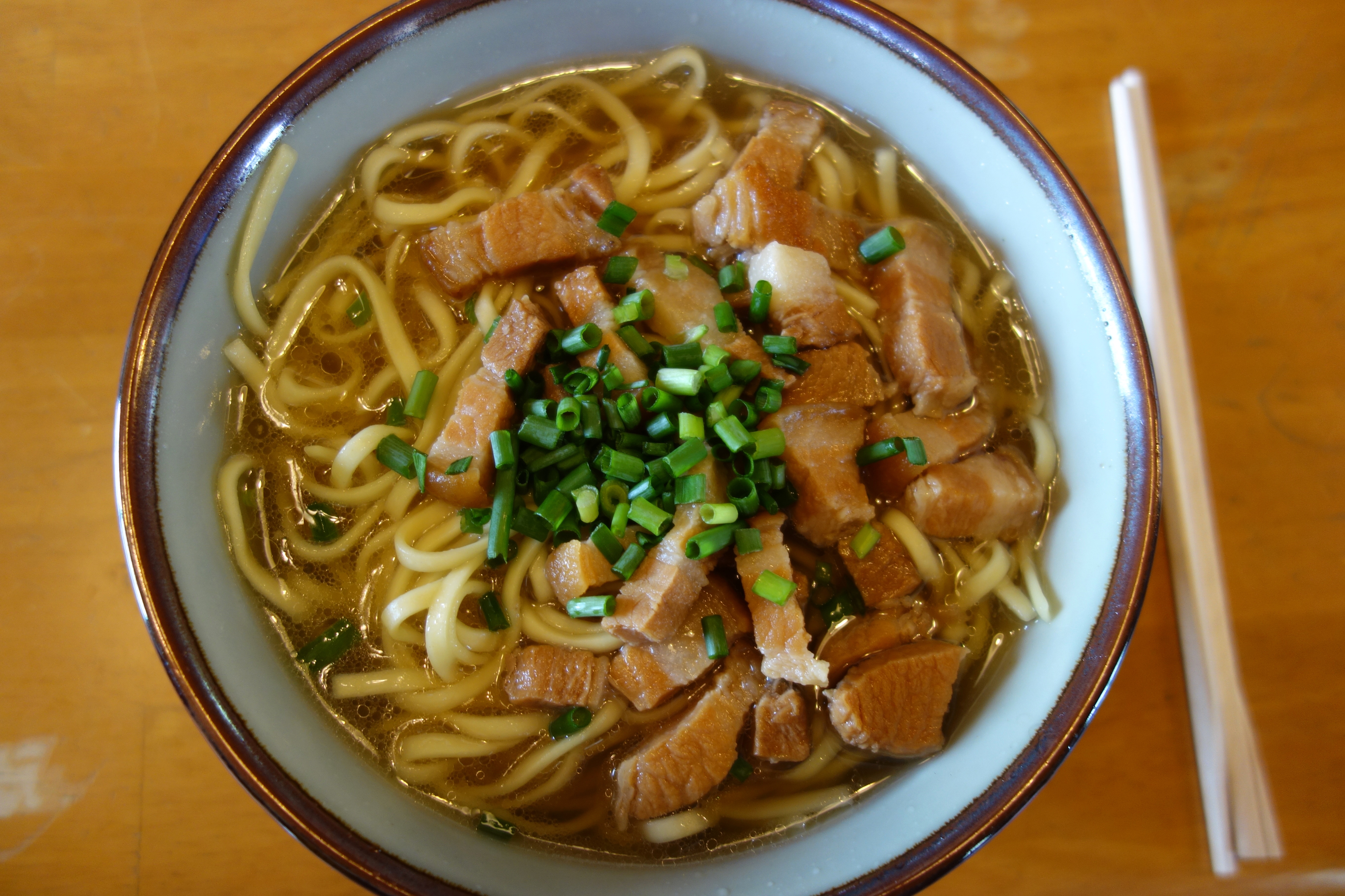 Yae-yama soba noodle